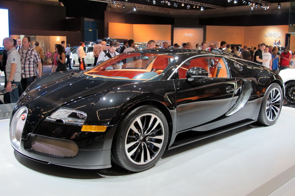 De Bugatti Veyron EB16.4 is het enige huidige seriemodel van de Franse autobouwer en Volkswagendochter Bugatti. De Veyron EB16.4 is de duurste auto momenteel op de markt, 1,8 miljoen euro per stuk.